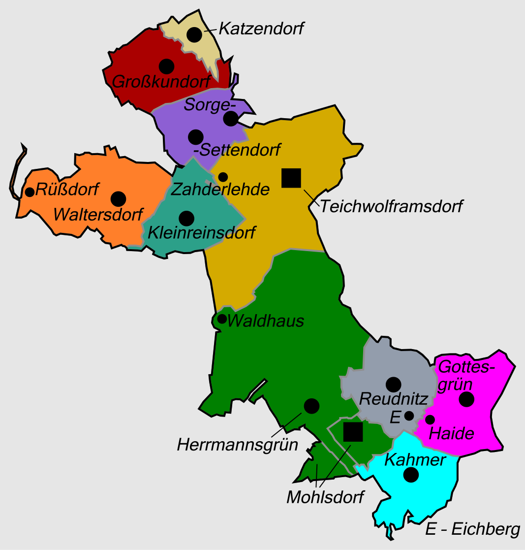 Gliederung der Gemeinde Mohlsdorf-Teichwolframsdorf ab 1. August 1924